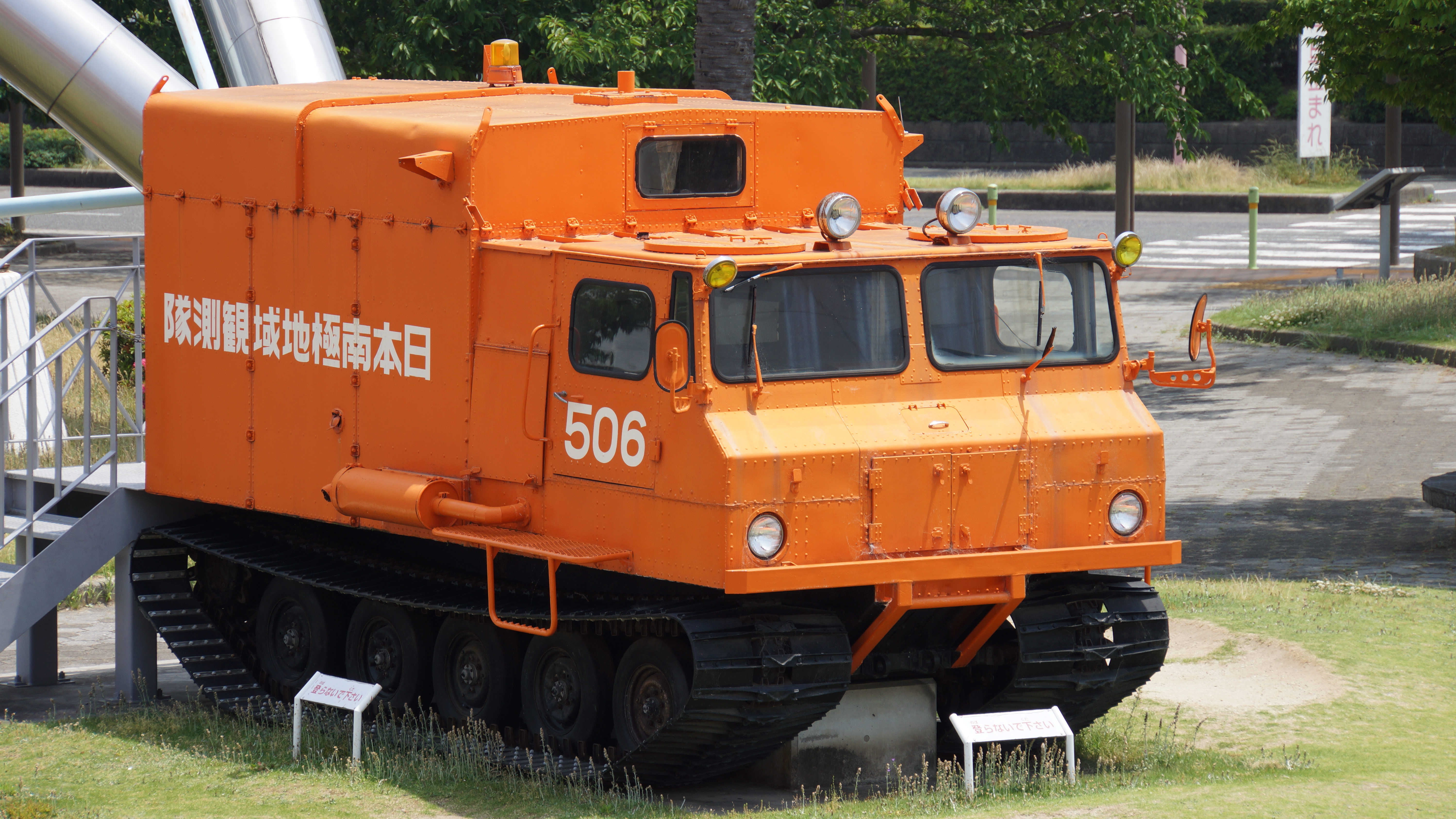 大原鉄工所製 SM50S型中型雪上車。 15年5月30日 名古屋港にて。